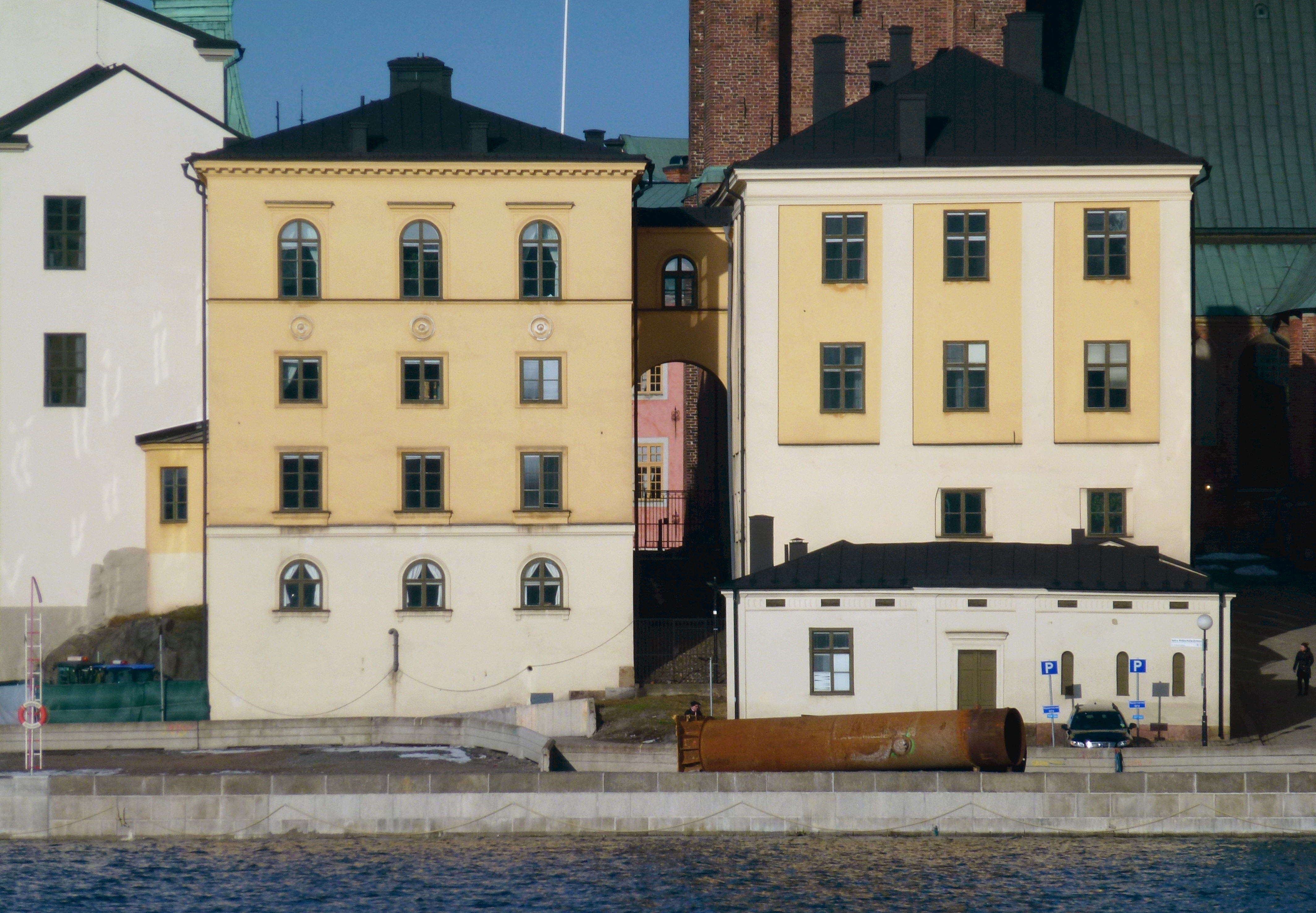 Västra och östra gymnasiehusen i mitten av bilden, framför Riddarholmskyrkan. Det östra gymnasiehuset är det högra.